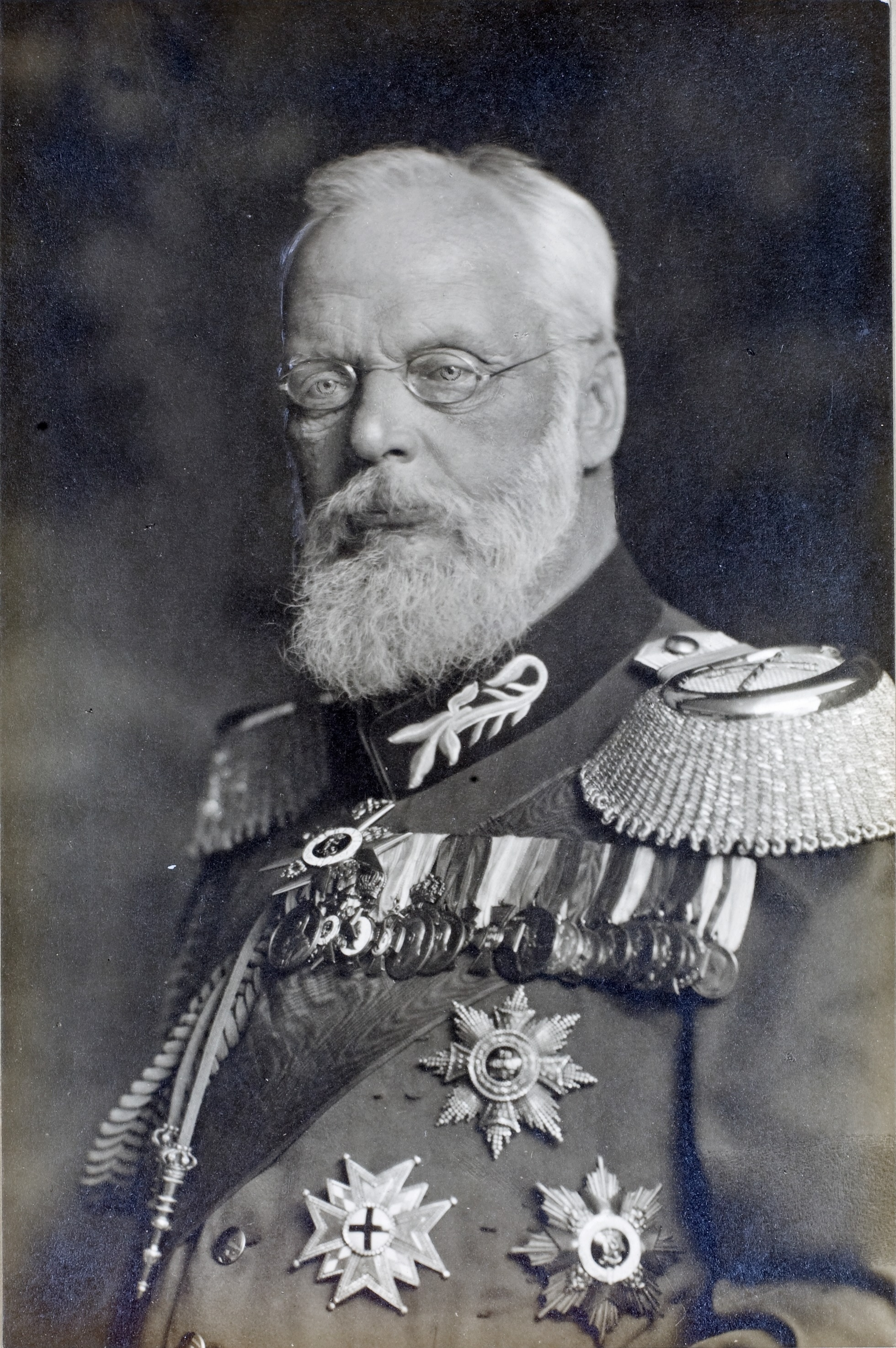 Ludwig III. von Bayern, 1912–1918 König von Bayern